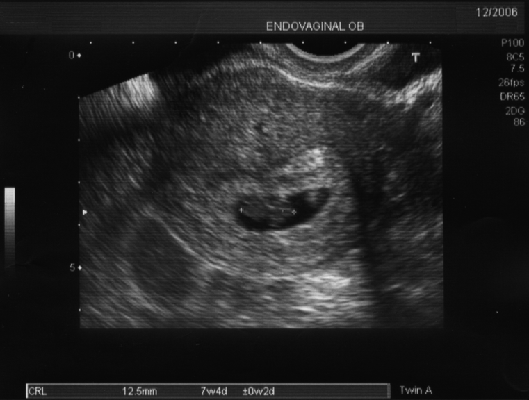 Ecografía (scan) de un feto de 7 semanas. En la parte superior se indica que ha sido realizada endovaginalmente. Como se indica en la parte inferior, el feto mide 12,5 mm. por lo que se estima una vida de 7 semanas y 4 días con un margen de error de 2 días.